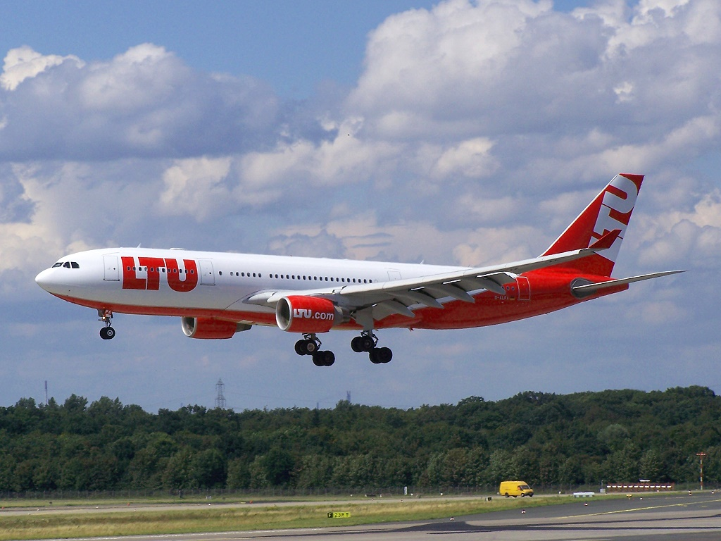 Ein A330-200 der LTU kurz vor der Landung auf den Flughafen Düsseldorf.